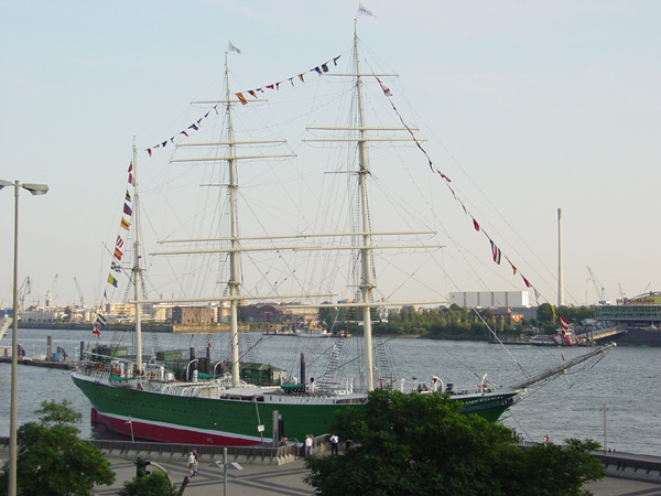 Foto: Andreas Gronski 2004, GNU_FDL (mit freundlicher Genehmigung des Fotografen)